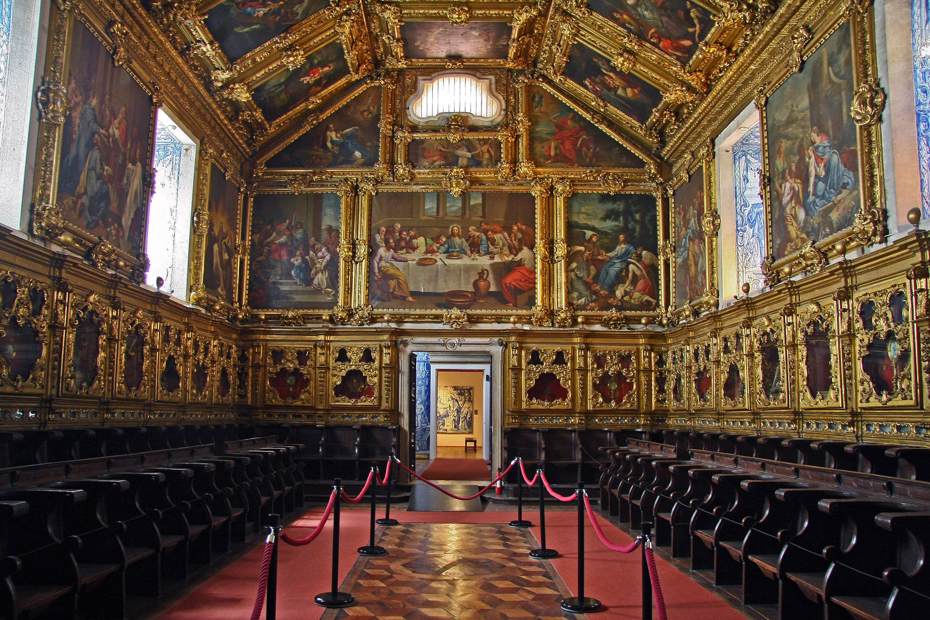 O Convento da Madre de Deus, outrora pertença da Ordem de Santa Clara, fica situado na zona oriental de Lisboa, e aloja actualmente o Museu Nacional do Azulejo. Mandado construir em 1509 pela Rainha D. Leonor, mulher do Rei D. João II, só cerca de 1550 é construída a actual igreja da Madre de Deus, por ordem do Rei D. João III, sendo posteriormente decorada já nos reinados de D. Pedro II, D. João V e D. José, entre finais do século XVII e meados do século XVIII. Neste templo, a talha e os azulejos constituem um dos melhores exemplos do Barroco em Portugal. Actualmente, a igreja da Madre de Deus é parte integrante do Museu Nacional do Azulejo, importante guardador de memórias da cultura portuguesa. O museu abriga em seus domínios uma extensa coleção que conta desde como o azulejo é fabricado, sua história, tendências e outros aspectos importantes que envolvem esse elemento decorativo e simbólico. Integrou, em 1983, a XVII Exposição Europeia de Arte Ciência e Cultura. Ao nome deste convento foi buscar o grupo musical português Madredeus o seu nome.